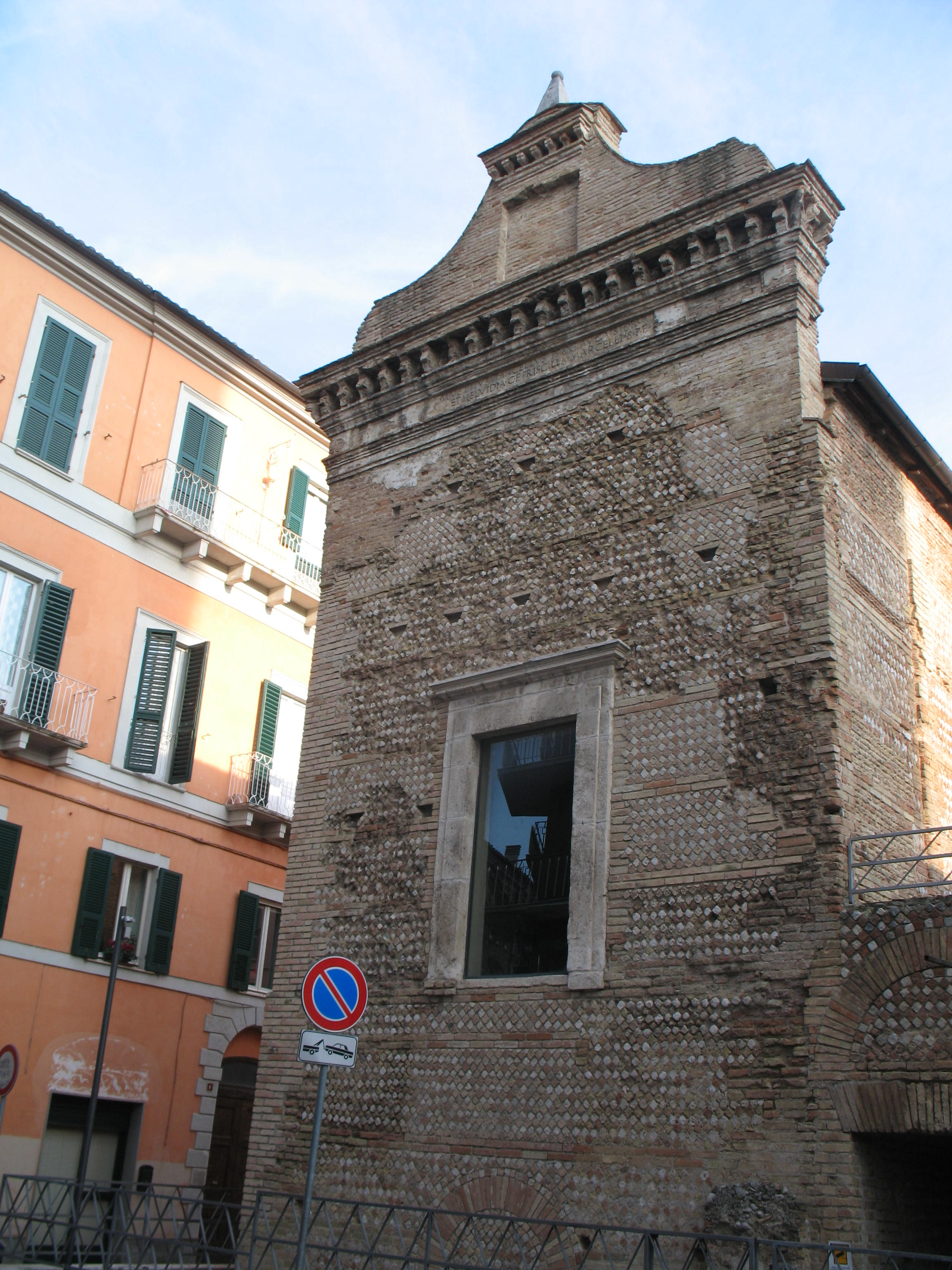 La fronte dei Templi Romani di Chieti